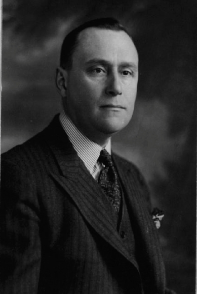 Pierre-Émile Côté, Quebec politician